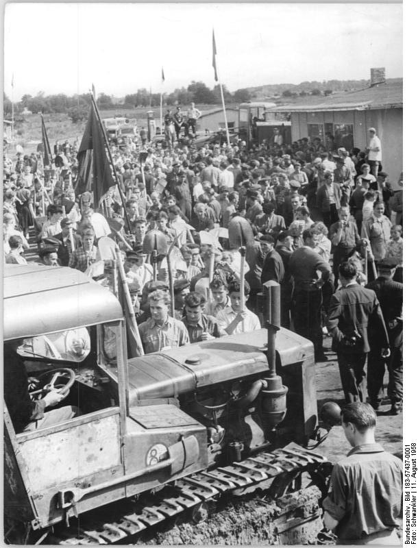 Eröffnung eines Meliorationsprojekts Zentralbild Schwankler 11.8.1958 Jugend baut Neue Milchstraße durch Friedländer Große Wiese. Das von der SED Bezirksleitung Neubrandenburg am Sonnabend der Bevölkerung dieses Agrarbezirks unterbreitete Aktionsprogramm zur Urbarmachung und wirtschaftlichen Erschli3ssung eines 15000 ha grossen Moorgebiets im Bereich der Friedländer Grossen Wiese hat in allen Teilen der Bevölkerung grossen Widerhall gefunden. Am 10.8.1958, also bereits einen Tag nach Verkündigung des Programms, trafen sich Hunderte von Jugendlichen mit Mitarbeitern der Bezirksleitung sowie Männer und Frauen aus der Umgebung zum ersten Einsatz auf der Grossen Wiese (Näheres siehe ADN-Meldung Nr. 216 vom 10.8.1958) UBz: Mitglieder der Jugendbrigaden haben sich zur Eröffnungskundgebung im volkseigenen Gut Fleethhof versammelt.